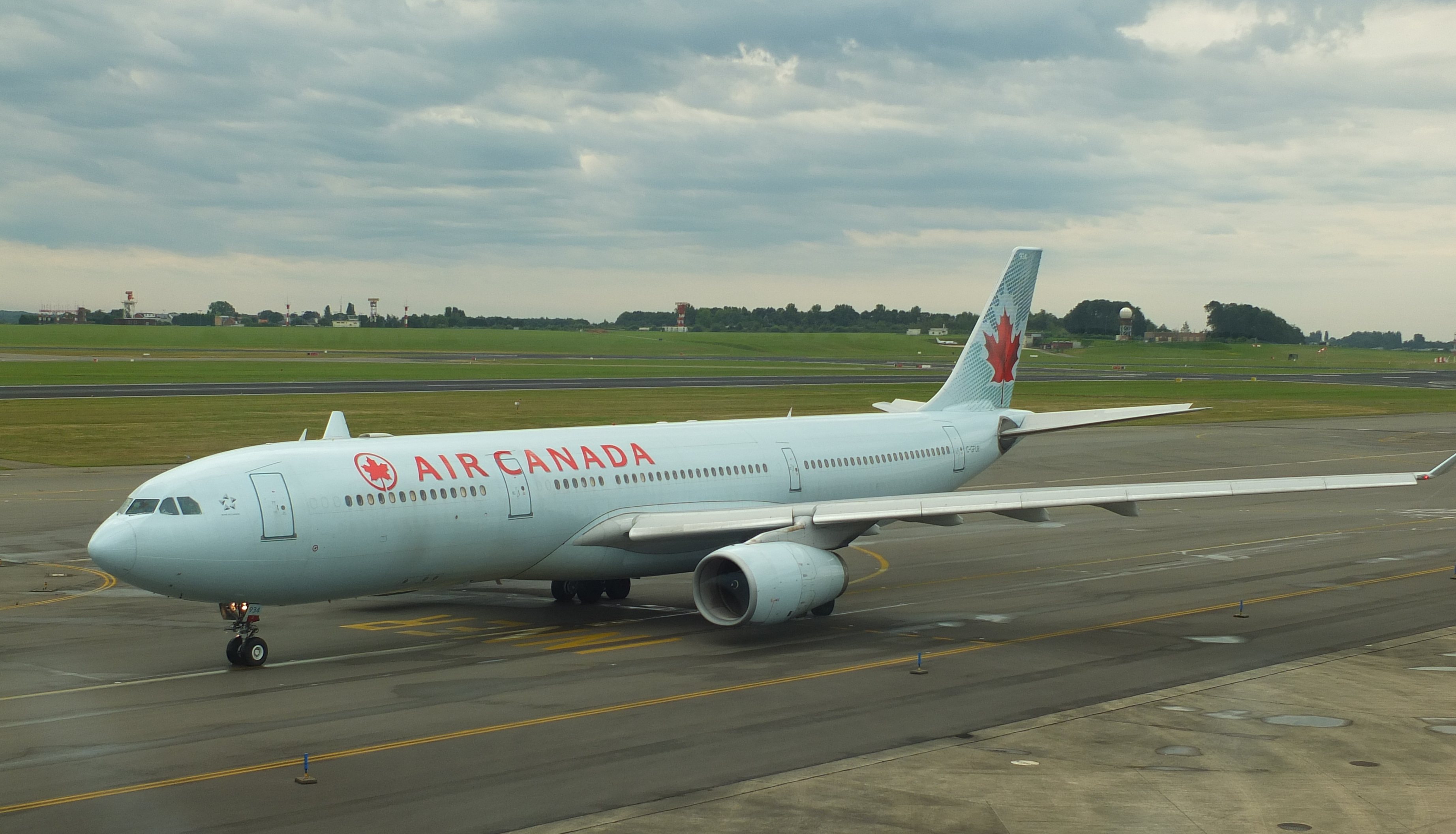 Air Canada Airbus A330-343 C-GFUR / 934 (cn 344) op Zaventem Brussels Airport.